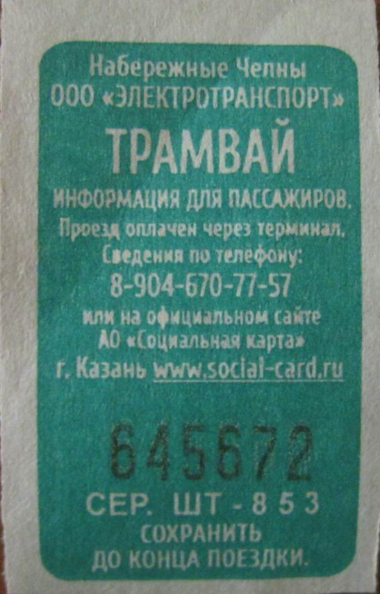 Билет на трамвай Набережные Челны (Брежнев). Выдаётся, если оплата проезда происходит по транспортным картам.